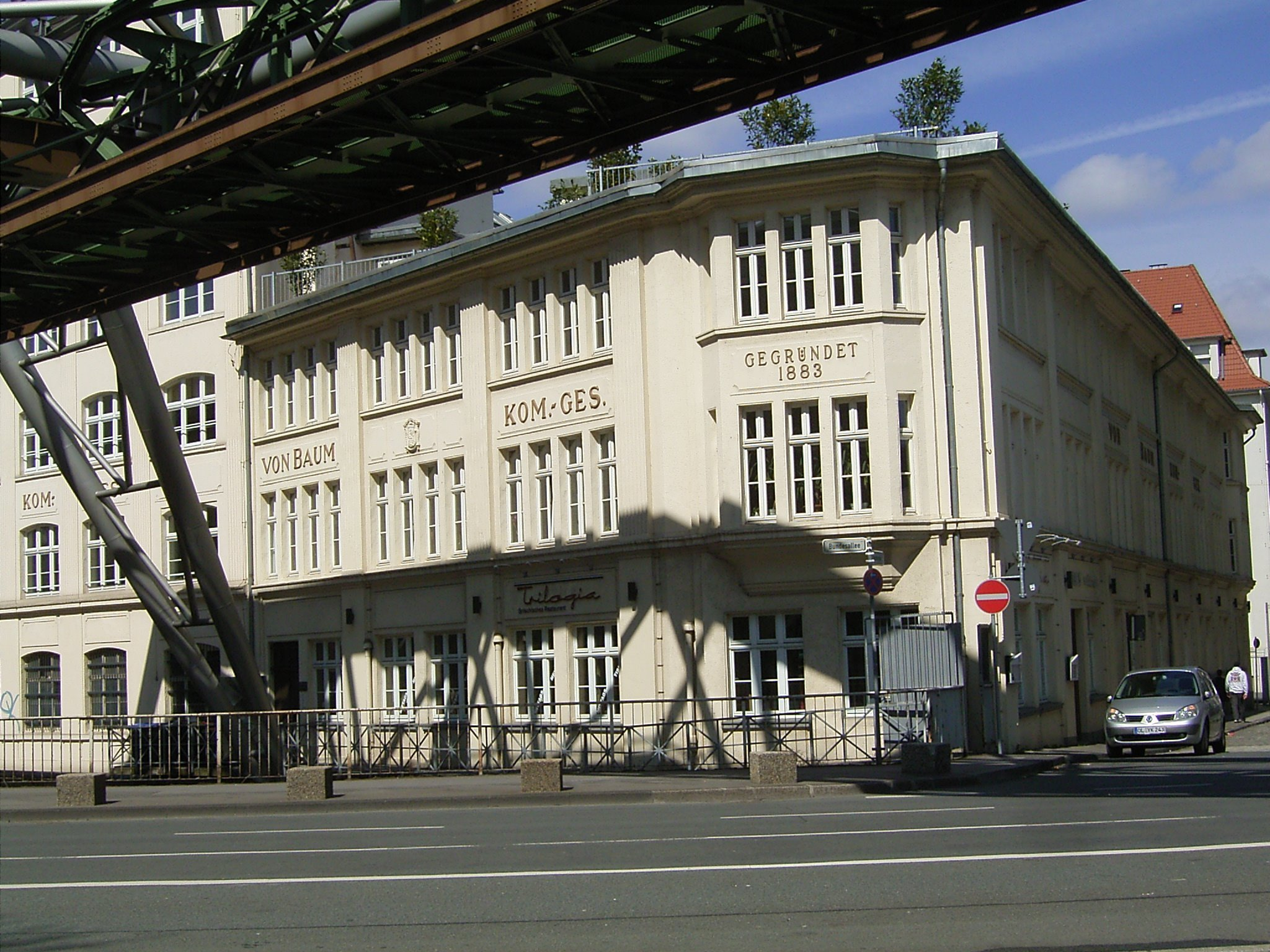 Brücke Bundesallee 1 in Wuppertal